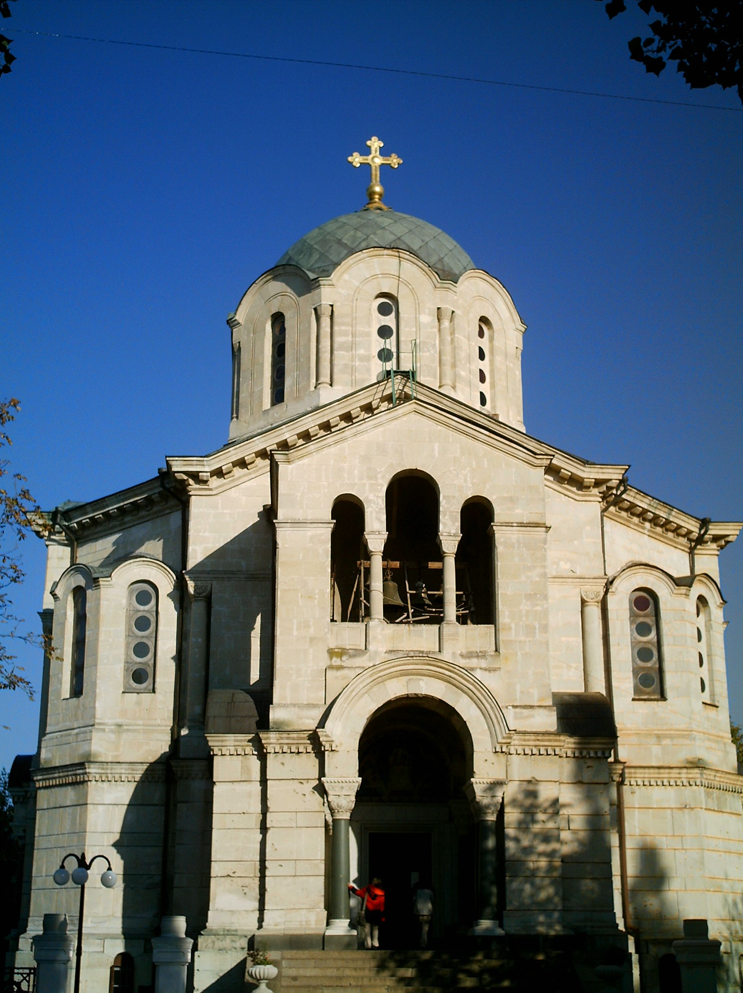 Собор святого равноапостольного князя Владимира в Севастополе Владимирский собор в Севастополе (усыпальница русских адмиралов)